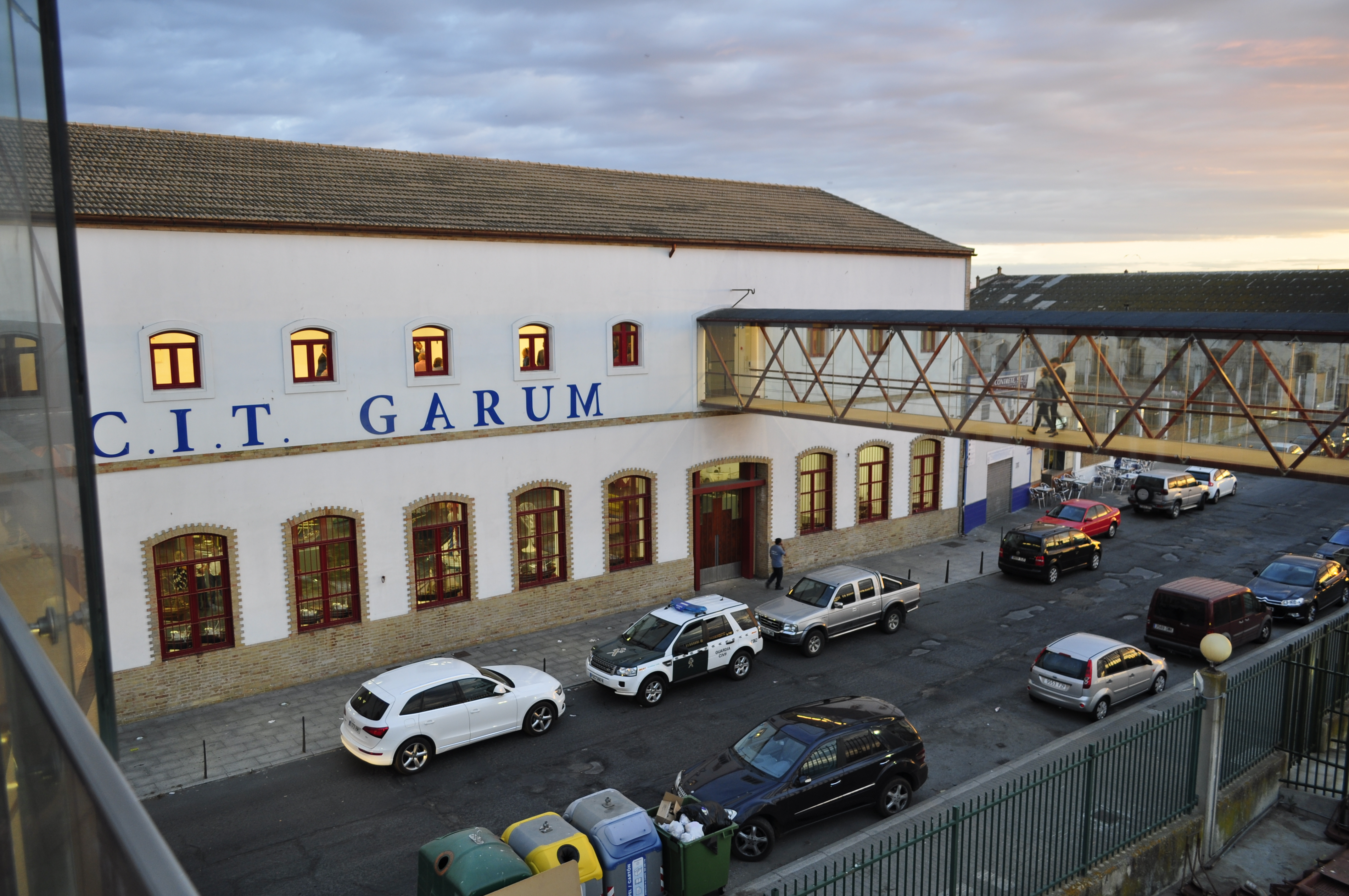 CIT Garum de Isla Cristina en la antigua fábrica de Conservas Mirabent